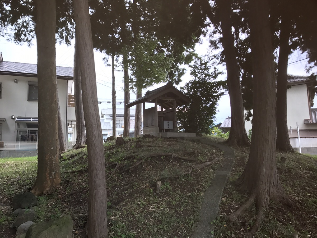 静岡県沼津市にある山ノ神古墳社